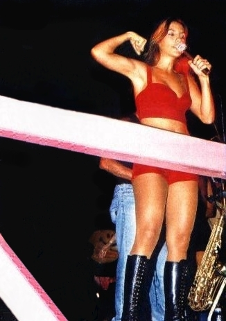 Registro pessoal do show da Banda Eva em 1997 em Recife.